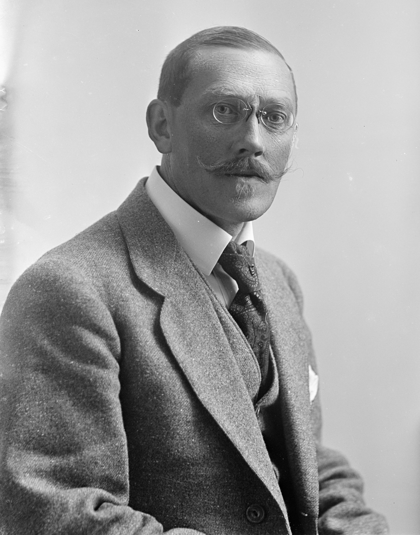 Arkitekt Sigurd Gulbransen avbildet ca. 1910–1915 (jf. dette oppslaget). Foto: Ernest Rude, fra Byhistorisk samling hos Oslo Museum.